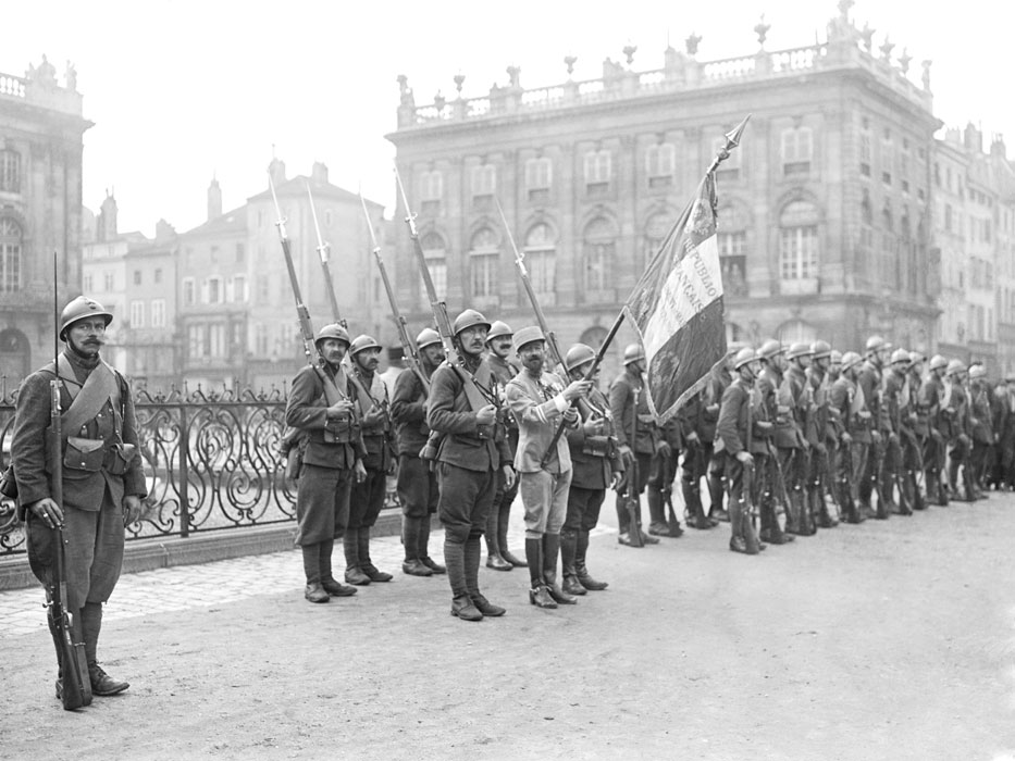 Revue du régiment de marche de la légion étrangère à la fin novembre 1918, place Stanislas à Nancy, 54, France.